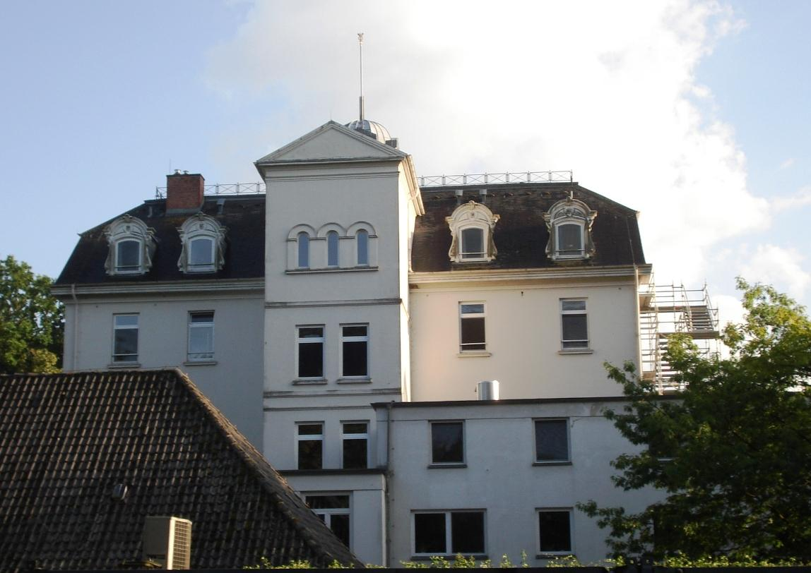 Das ehemalige Hotel "Holsteinische Schweiz"